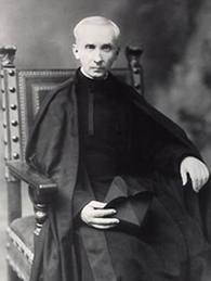 Wladimir Ledochowski (1868-1942), seit 1914 General der Jesuiten